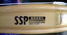 label SSP.jpg